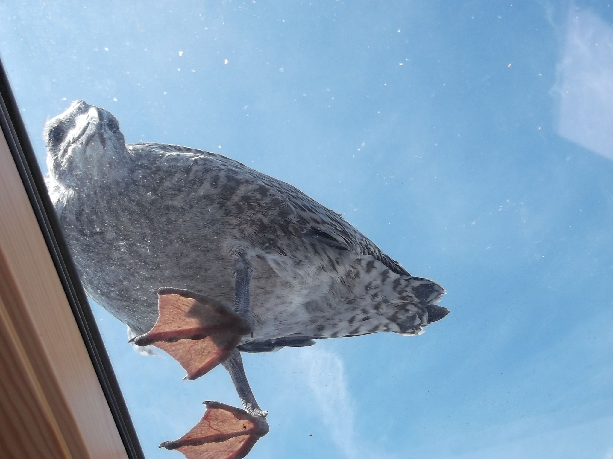 Un goéland argenté juvénile bien curieux.